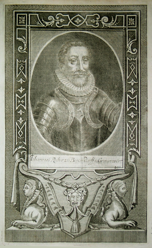 Hans Rueber zu Pixendorf und Grafenwörth (1529-1584), kaiserlicher Feldoberst und österreichisch-ungarischer General